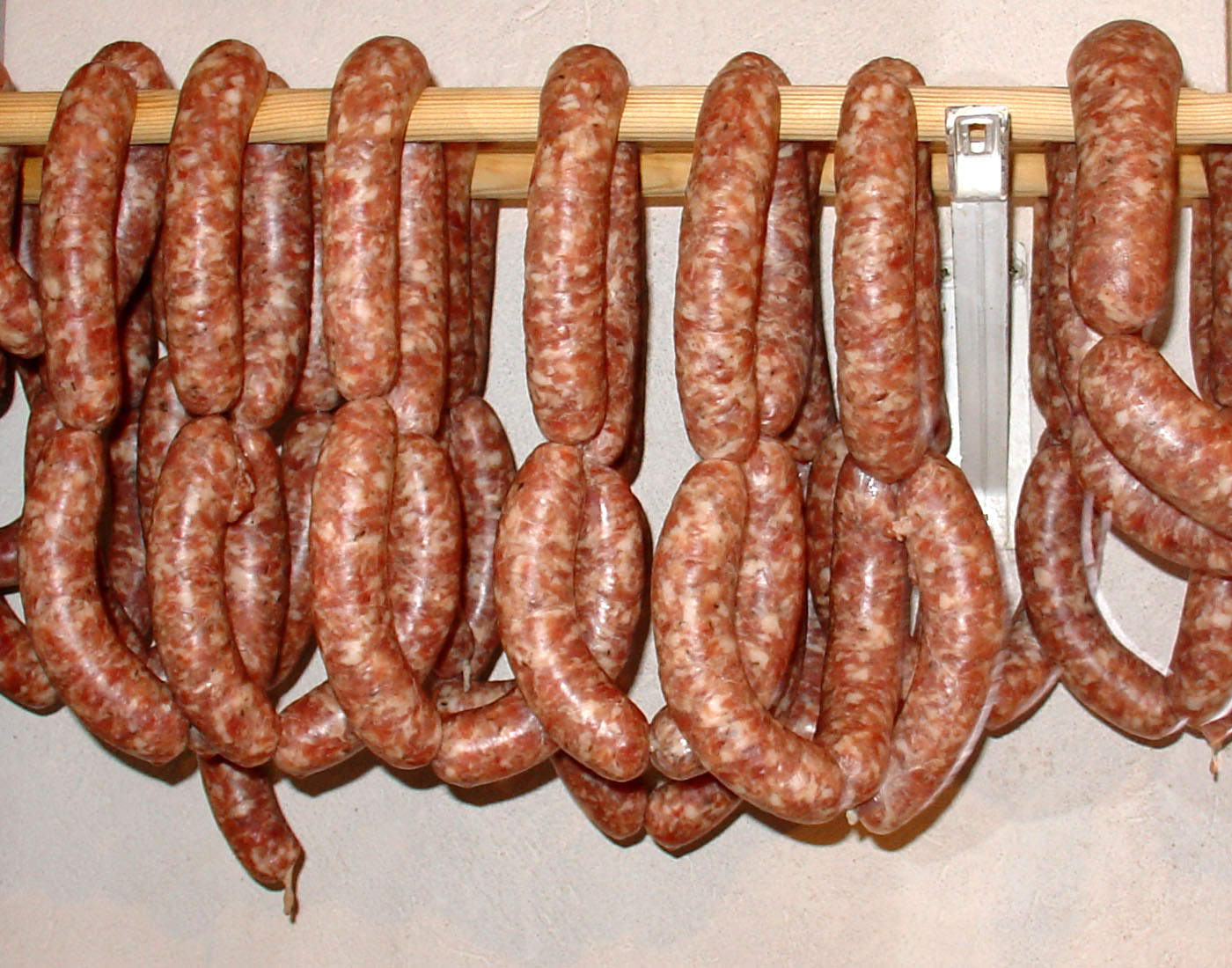 rohe sächsische Knacker bei Hausschlachtung (vorm räuchern)